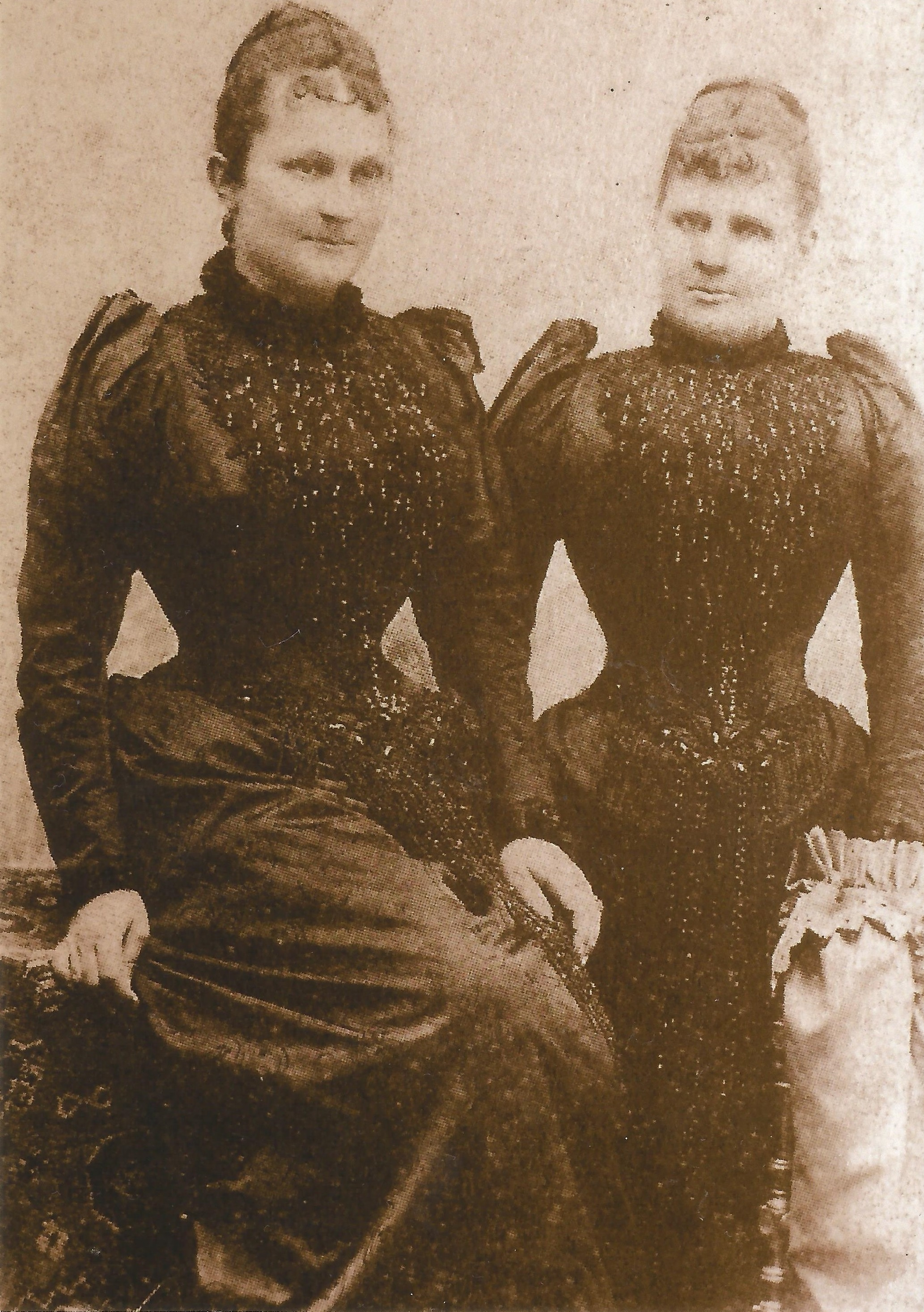 Csertán Károlyné lovászi és szentmargitfai Sümeghy Magdolna (1855–?) és leánytestvére Boldogfai Farkas Józsefné lovászi és szentmargitfai Sümeghy Rozália (1857–1926), a család két utolsó tagja